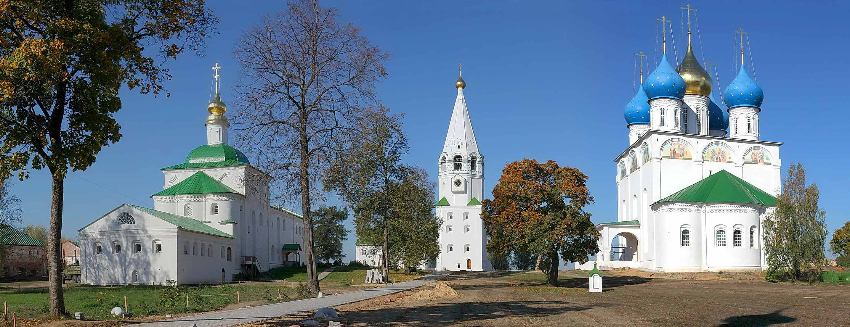 Панорама Флорищевой пустыни. Сентябрь 2010 года.